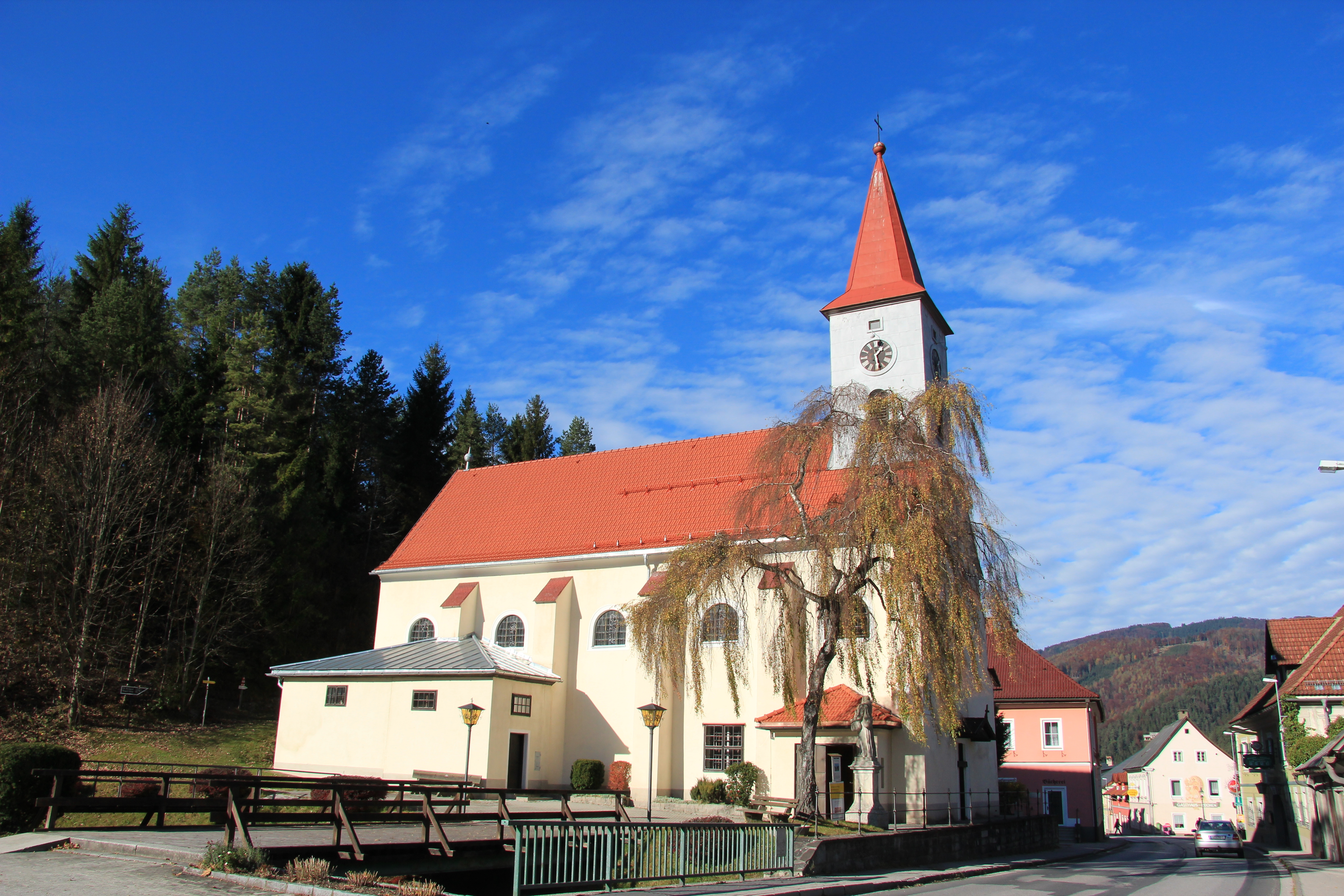 Kath. Pfarrkirche hl. Jakobus der Ältere